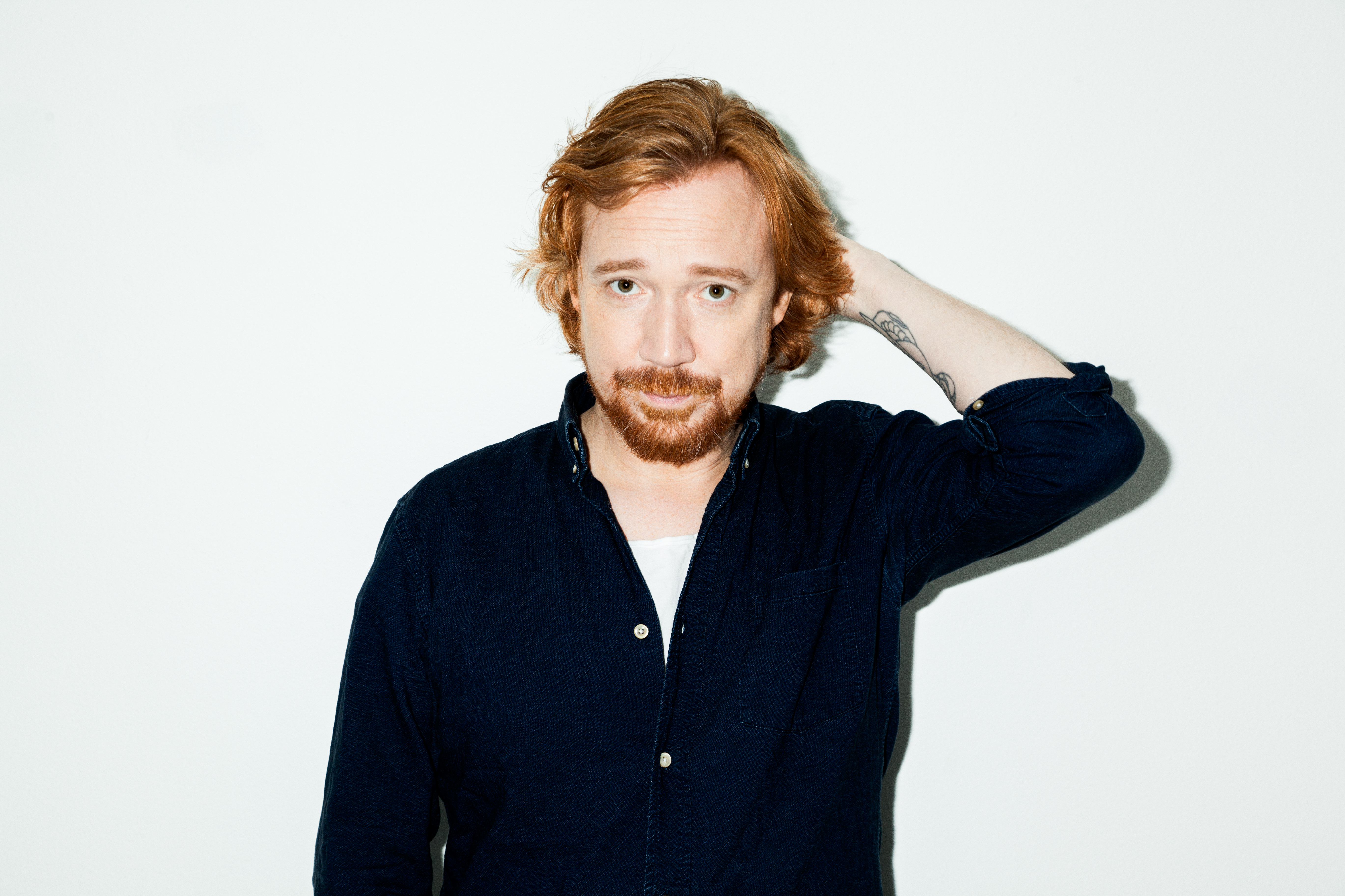 Artisten Lars Winnerbäck.